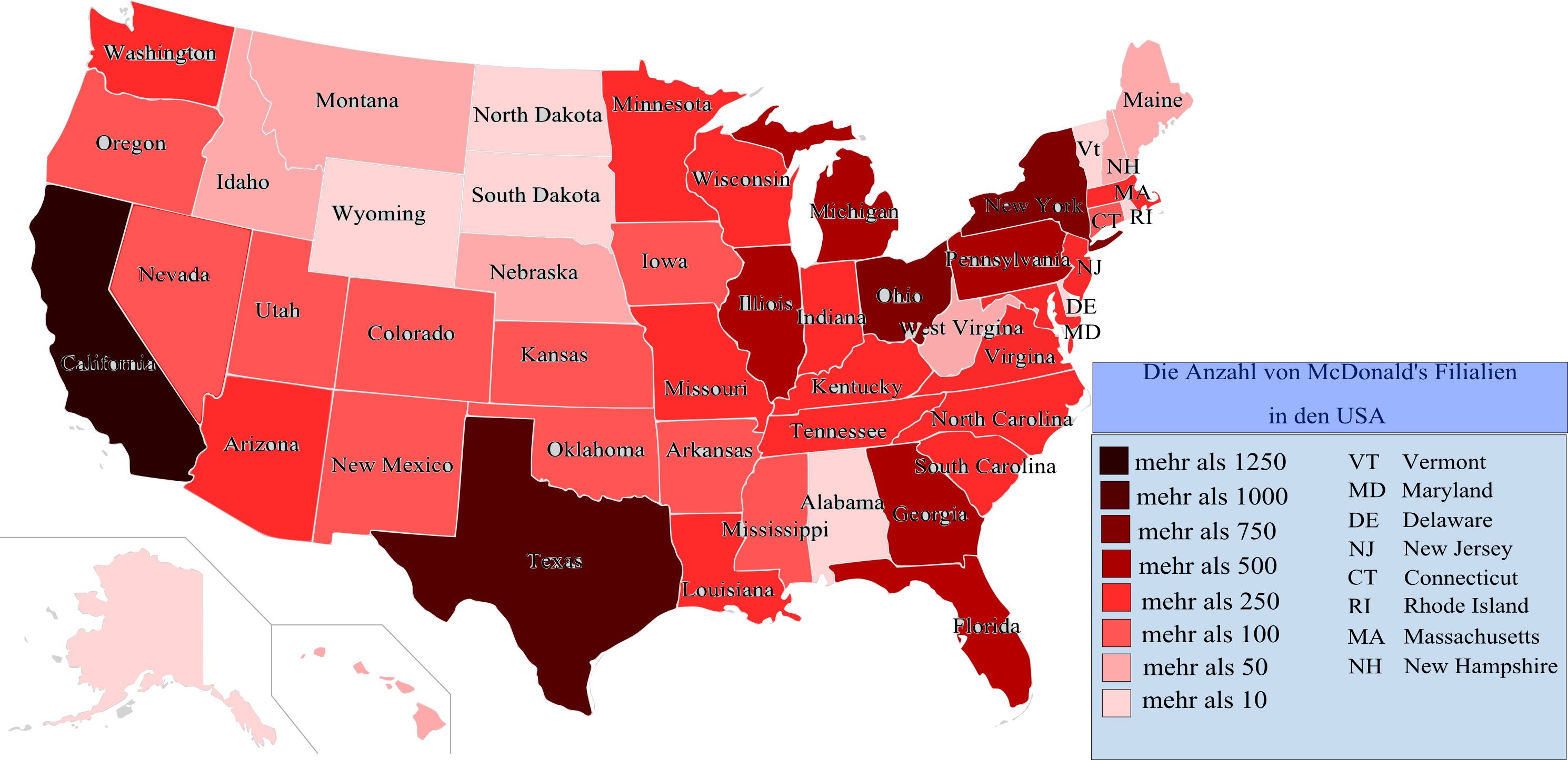 Die Anzahl der McDonalds-Filialen in den verschiedenen Bundesstaaten der USA.